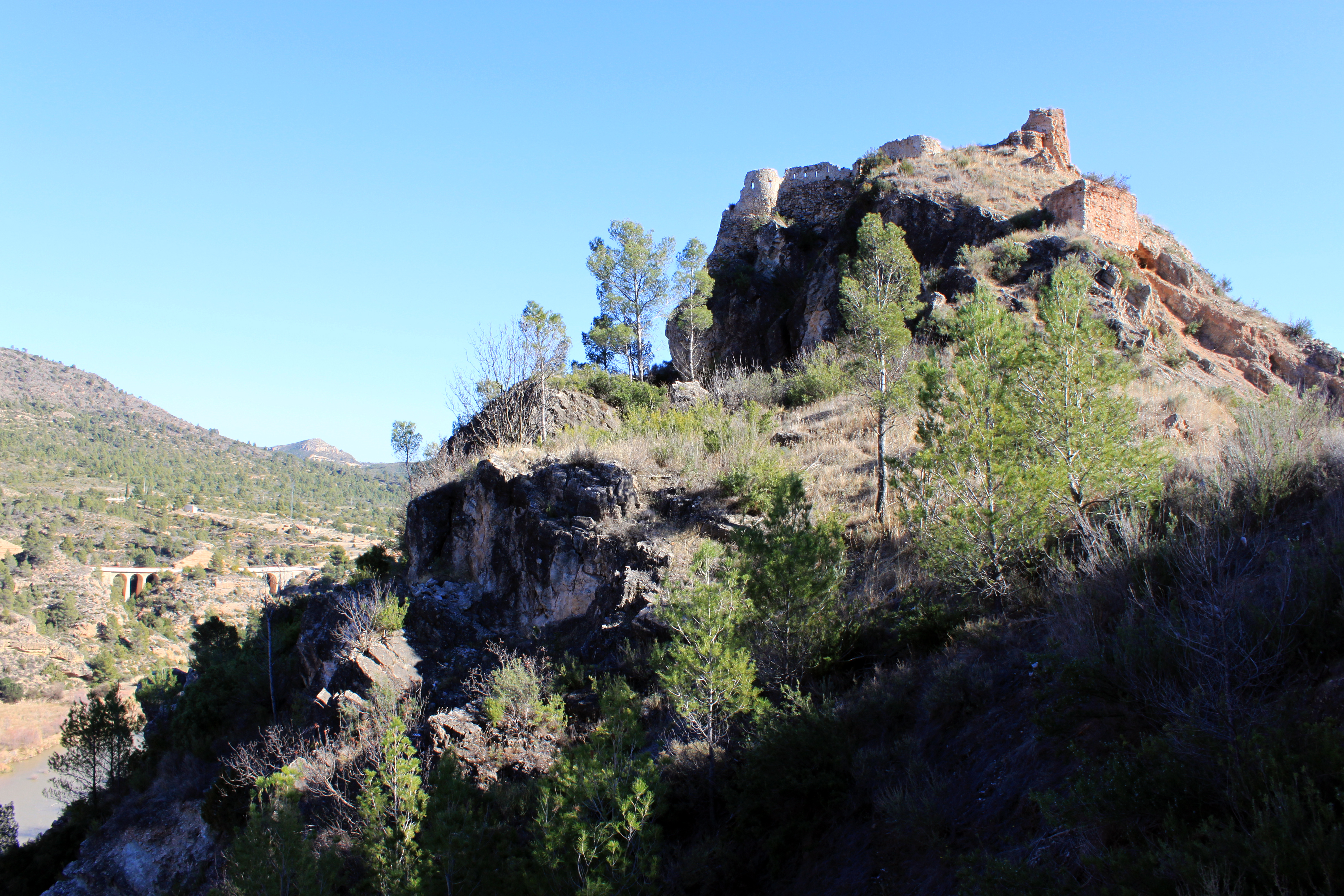 Castillo de Domeño, provincia de Valencia, Comunidad valenciana, España.